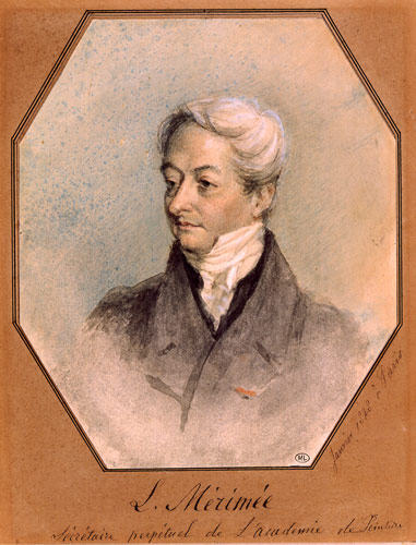 Леонор Мериме